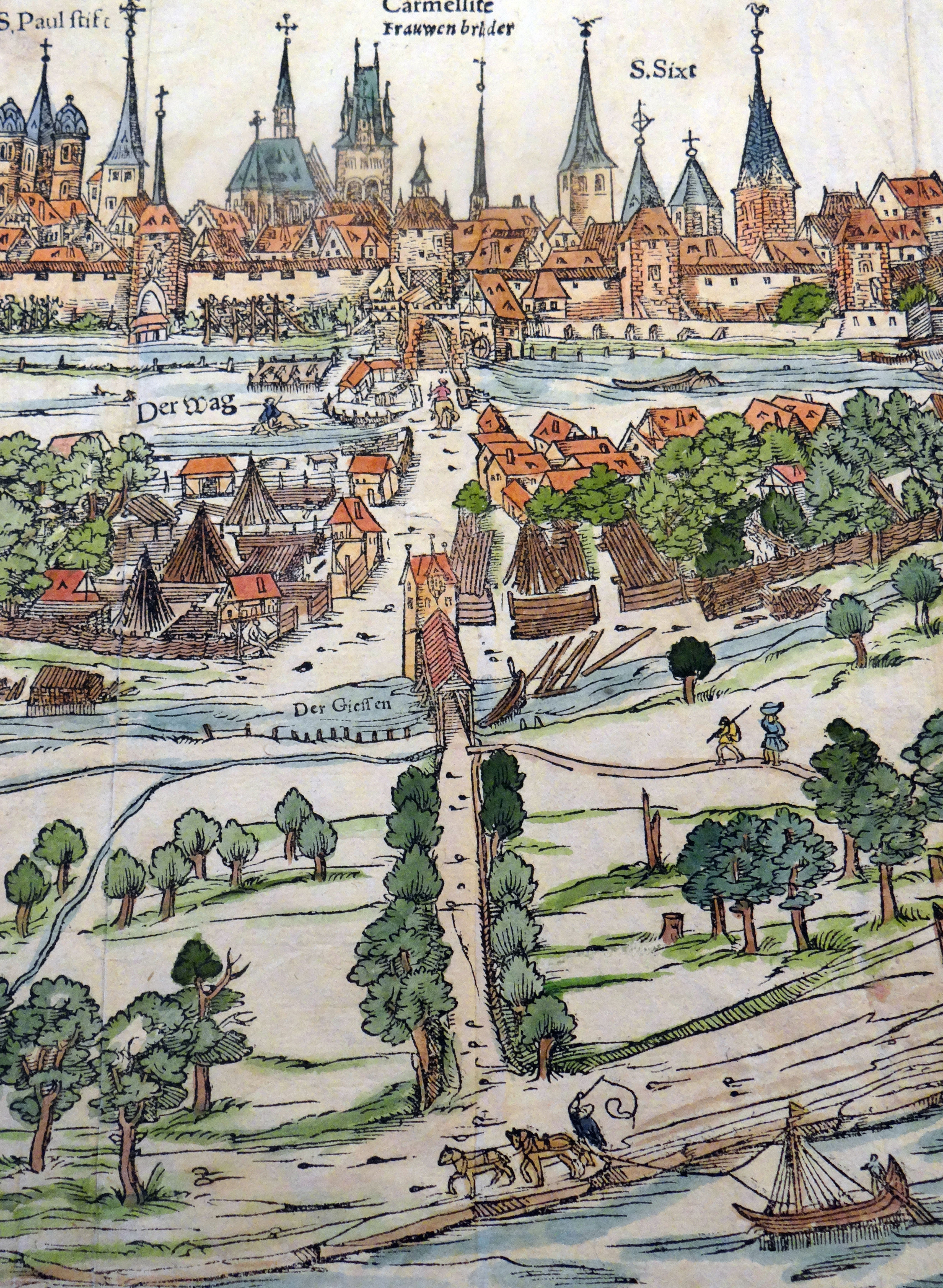 Rheinpforte, Woog- und Gießenübergang, Rheinufer. Detail aus: Sebastian Münster: Cosmographey. Hencicpetrina, Basel 1572, S. DCXCIII–DCXCVI. Stadtarchiv Worms: Abt. 217 Nr. 1478.